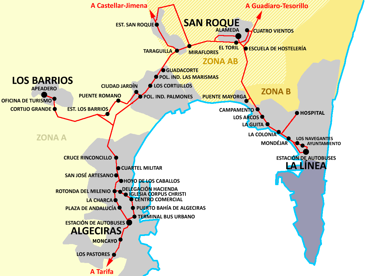 Zonas tarifarias del Consorcio de Transporte Metropolitano del Campo de Gibraltar. Detalle de la Bahía de Algeciras.